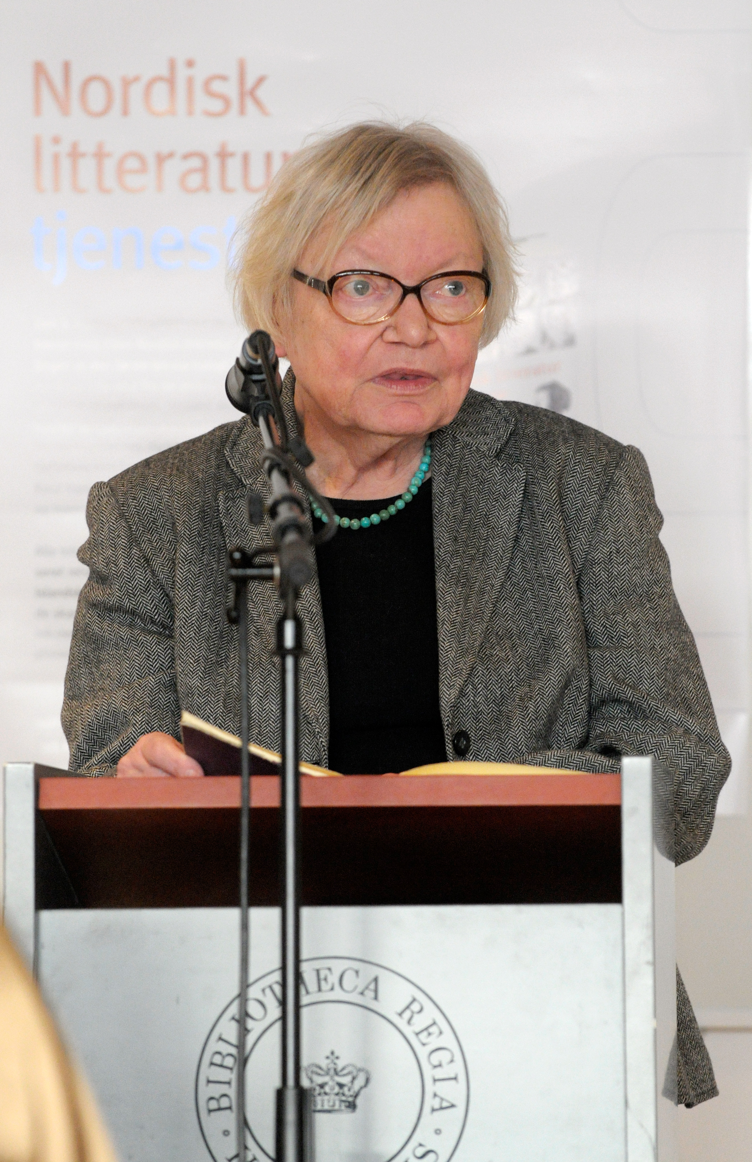 Inger Christensen läser ur ett av sina verk vid lanseringen av Nordisk litteratur til tjeneste på Sorte diamant i Köpenhamn 2008-03-05